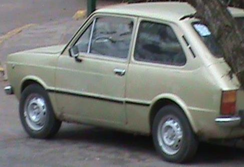 Fiat 133 fabricado en Argentina